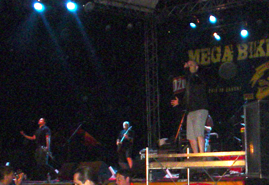 Punk-rock sastav Hladno pivo na moto susretima u Slavonskome Brodu (SRC Poloj).